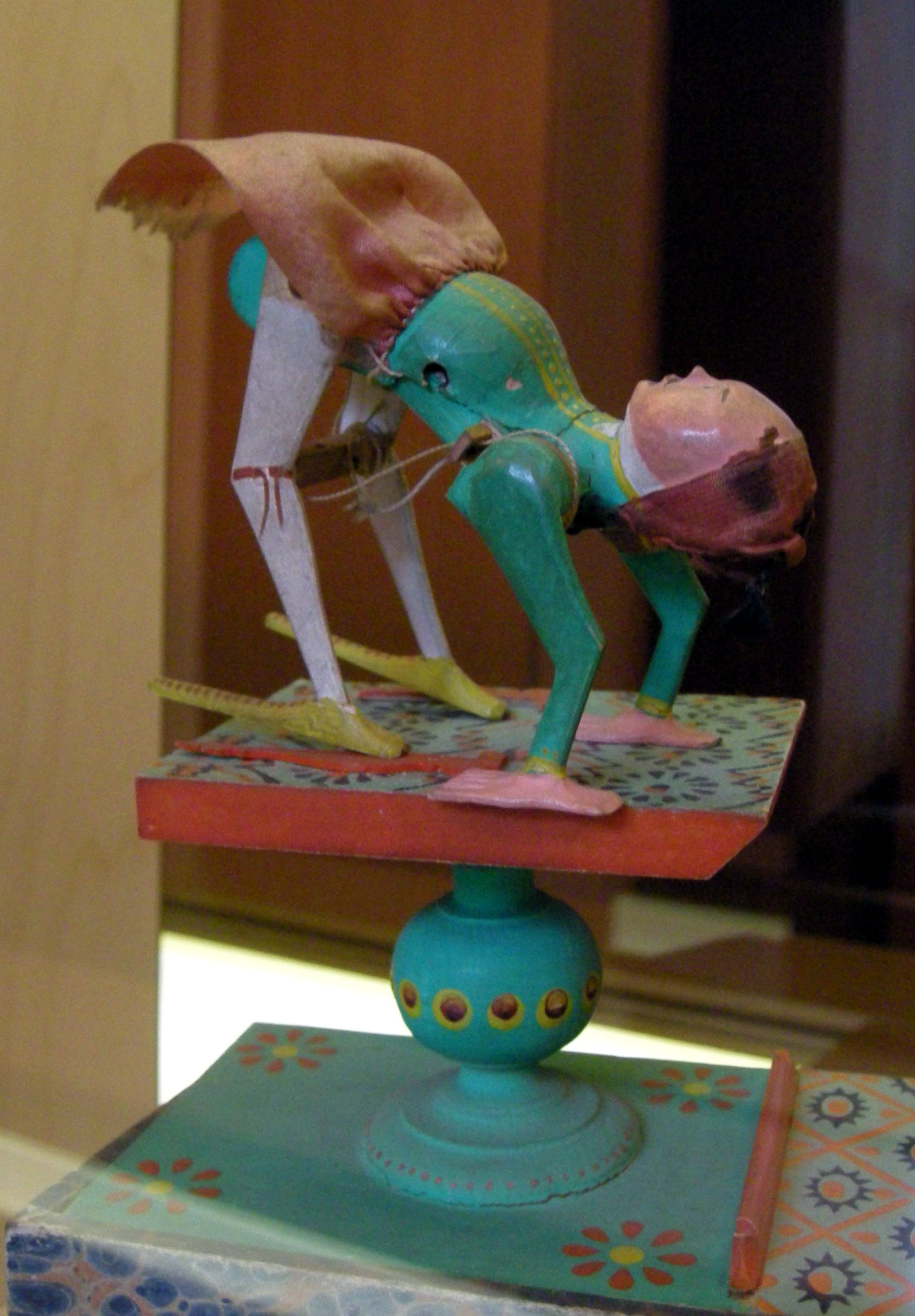 Sauteur chinois du 18ème siècle, jouet présenté au musée Jean-Frédéric Oberlin de Waldersbach (Bas-Rhin)